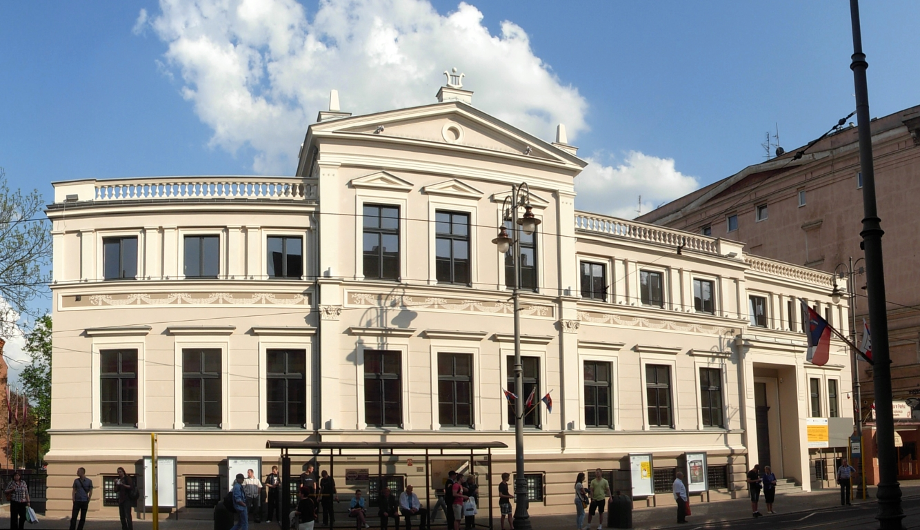 Dawne kasyno cywilne (1887), Pomorski Dom Sztuki, od 2006 r. w gestii Akademii Muzycznej w Bydgoszczy, ul. Gdańska 20